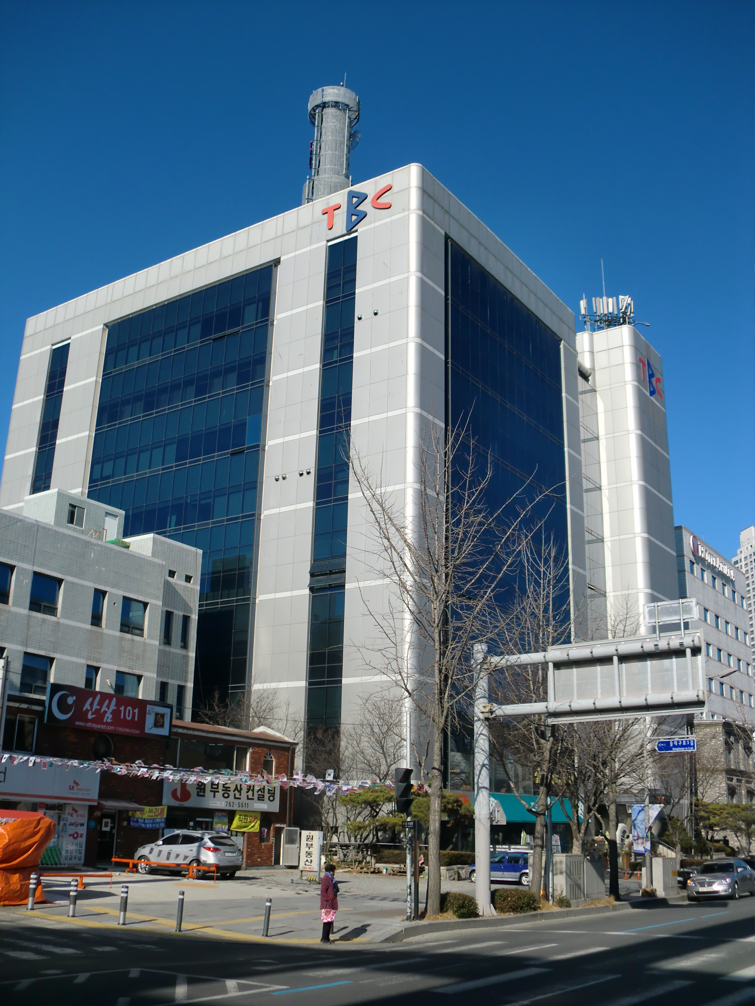 대구광역시 수성구에 있는 TBC